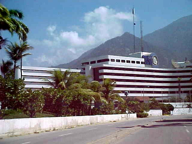 Caribe y Caraballeda en el estado Vargas - Venezuela a un año de del deslave de diciembre de 1999 (2000)